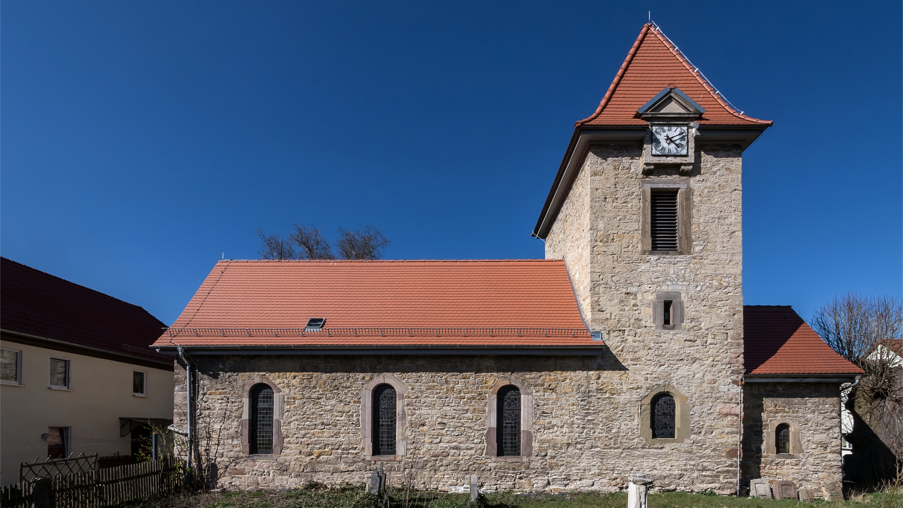 Barchfeld Dorfkirche mit Kirchhof